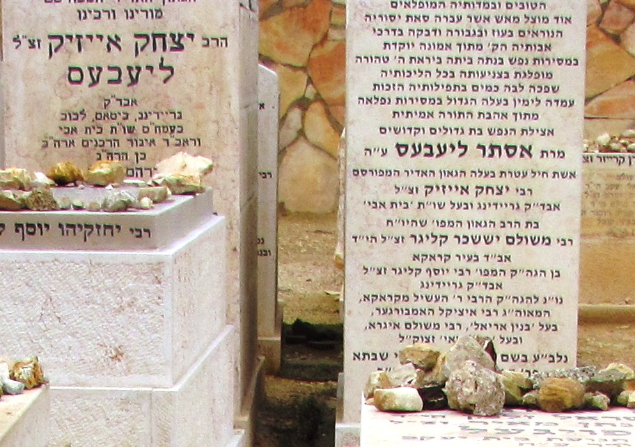 קברם של רבי יצחק אייזיק ליבס ורעייתו אסתר